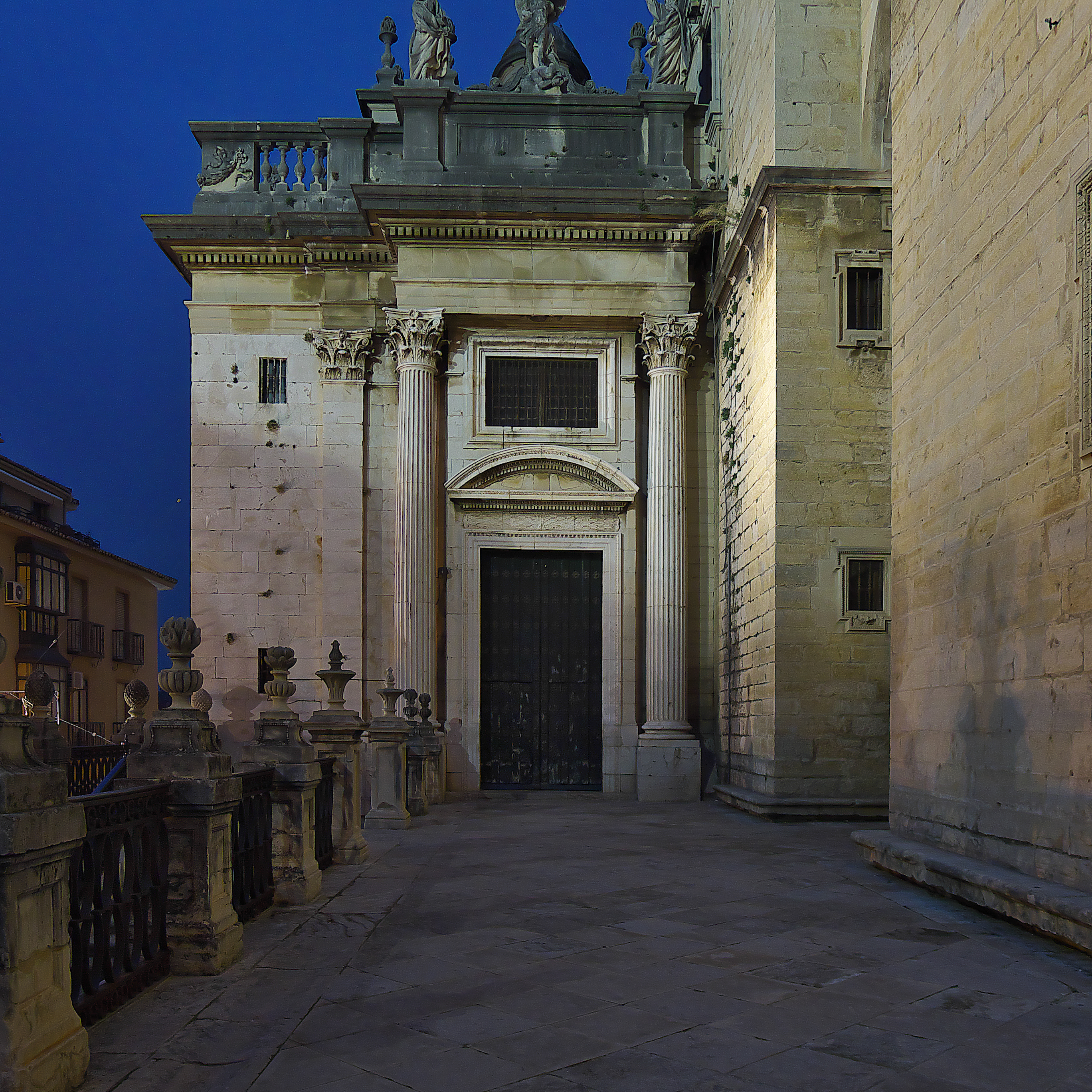 Proyectada por Ventura Rodríguez (1761) es ejecutada por Manuel Martín Rodríguez (1762).